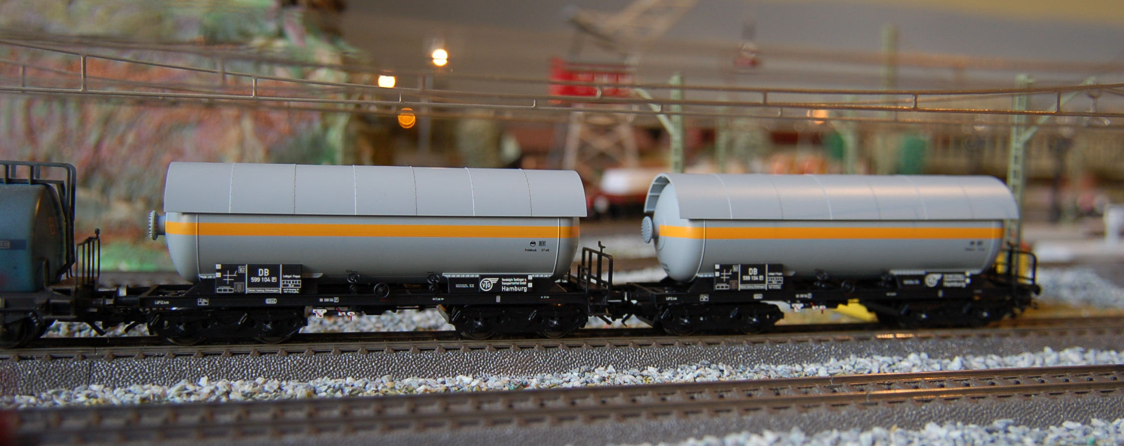 Coppia di vagoni cisterna per gas, epoca III, art.46450, prod. 2007